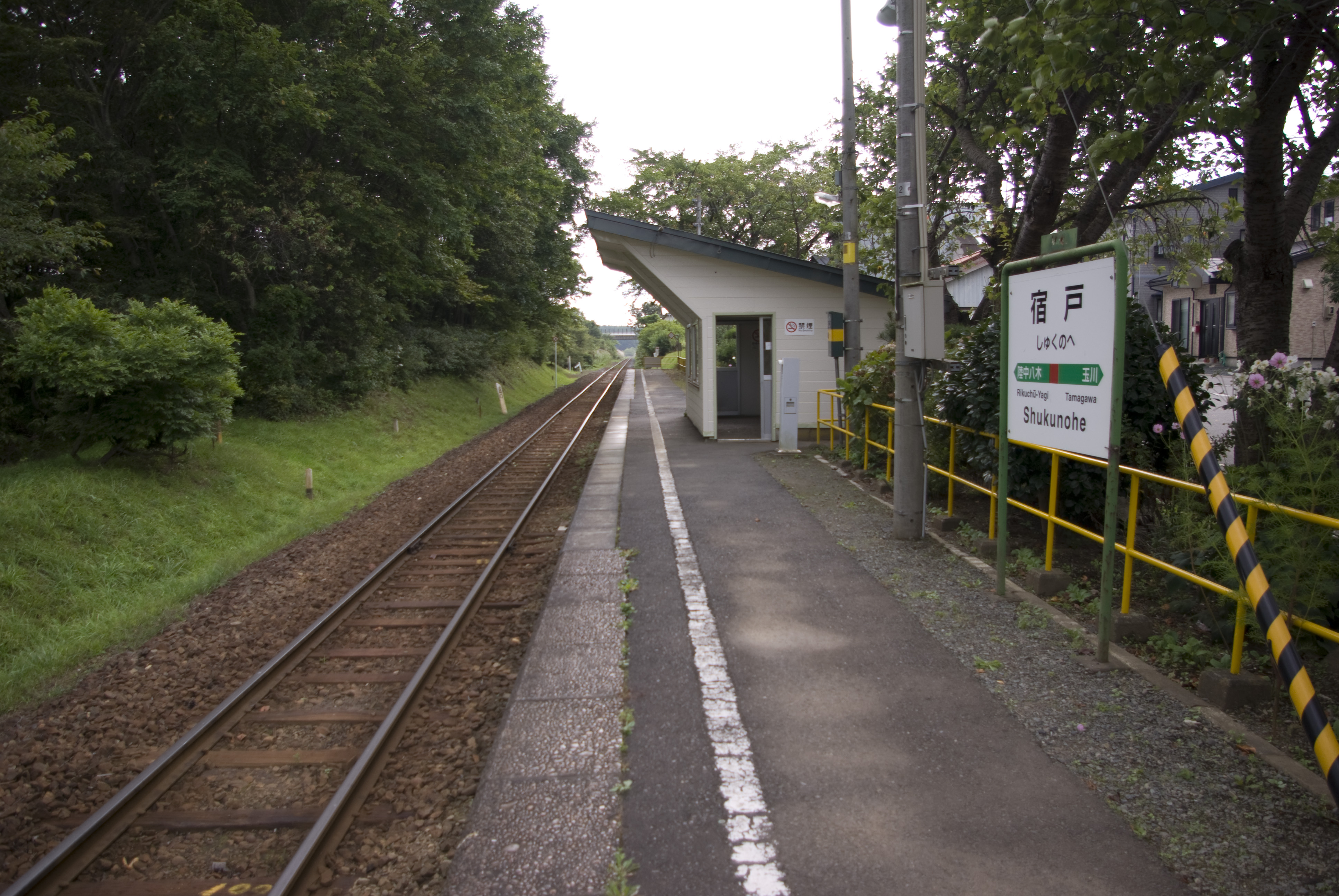 JR八戸線宿戸駅